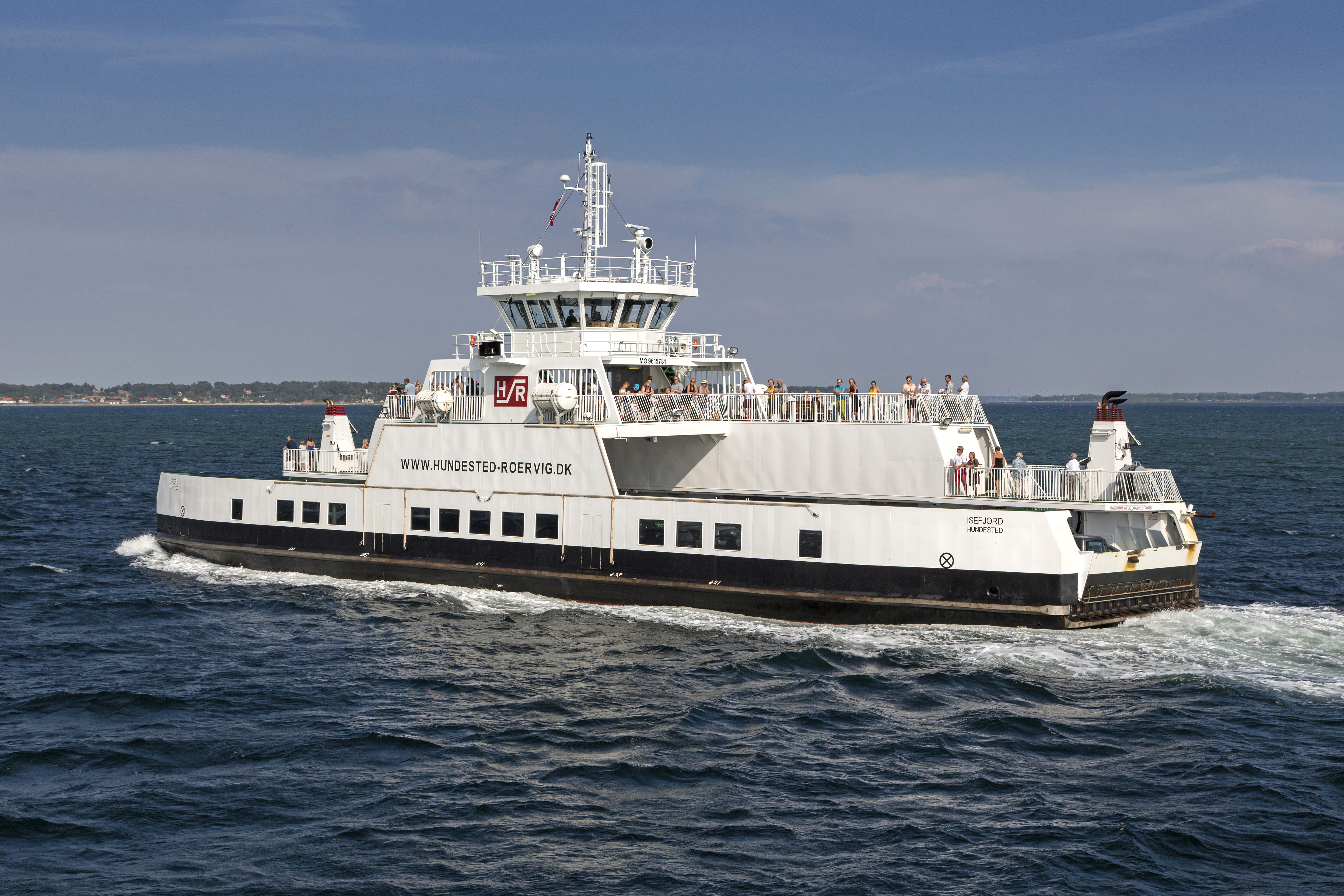 Hundested-Rørvig færvefart (ferry), Hundested, Rørvig, Sjælland (Zealand), Danmark (Denmark), Øresundsregionen, Öresundsregionen, The Oresund Region. Photo: News Øresund - Johan Wessman © News Øresund Detta verk av News Øresund är licensierat under en Creative Commons Erkännande 3.0 Unported-licens (CC BY 3.0). Bilden får fritt publiceras under förutsättning att källa anges (Foto: News Øresund - Johan Wessman). The picture can be used freely under the prerequisite that the source is given (Photo: News Øresund - Johan Wessman). News Øresund, Malmö, Sweden. News Øresund är en oberoende regional nyhetsbyrå som ingår i projektet Øresund Media Platform som drivs av Øresundsinstituttet i partnerskap med Lunds universitet och Roskilde Universitet och med delfinansiering från EU (Interreg IV A Öresund) och 14 regionala; icke kommersiella aktörer.